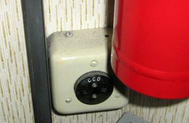 Кнопка включение ССО в салоне самолета